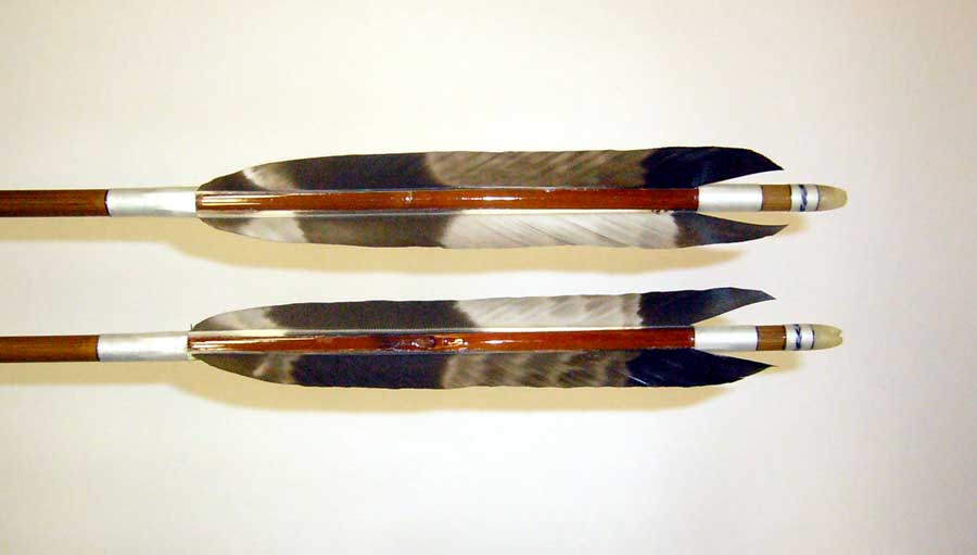 Kyudo Ya/Arrow.